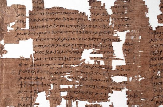 Papiro di Artemidoro (Artemidorus papyrus)